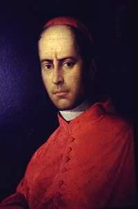 Kurienkardinal Theodulf Mertel